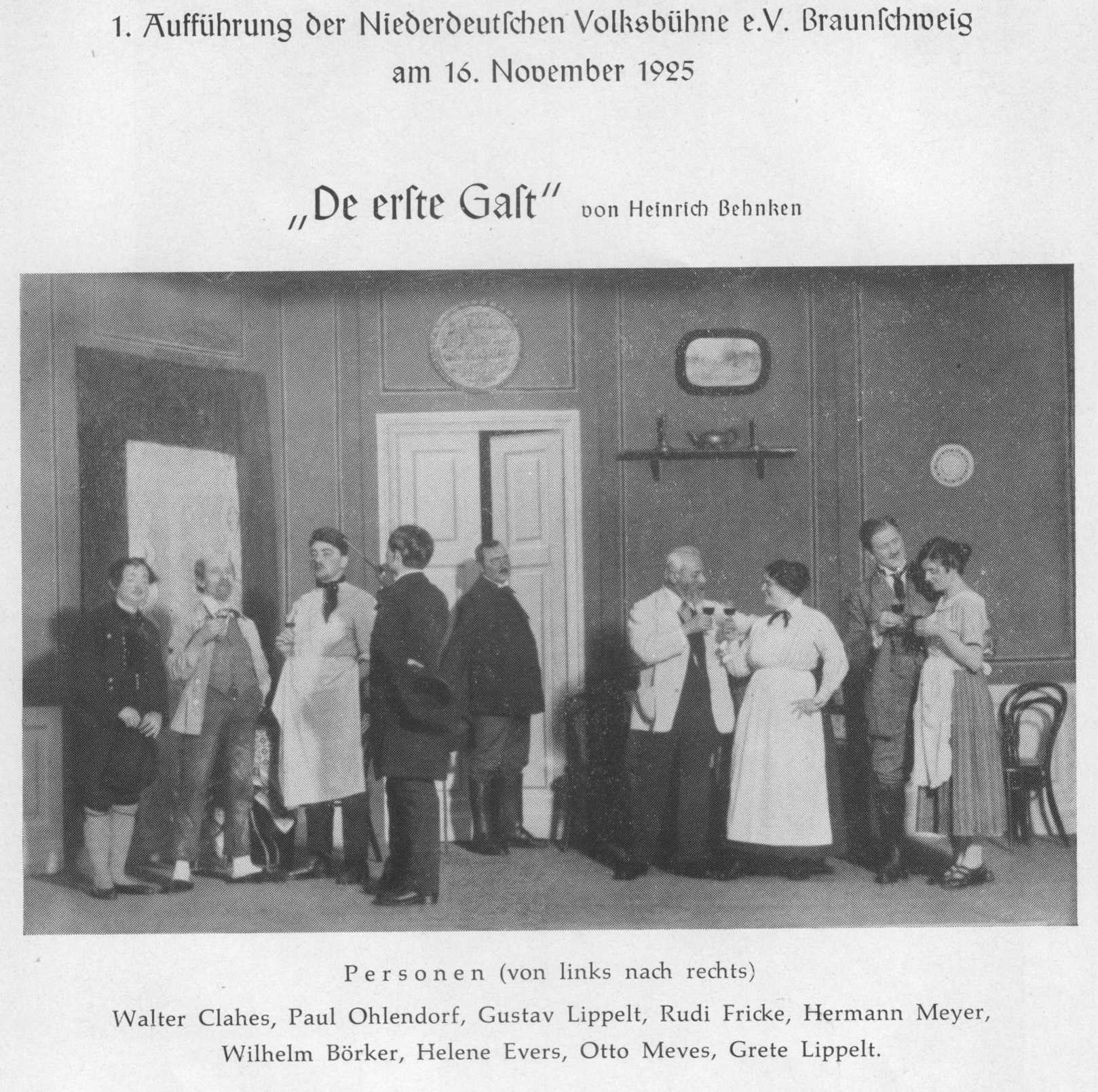 Die allererste Aufführung im Herbst 1925 Brunswick.knights für Niederdeutsches Theater Braunschweig e.V. Brunswick.knights 20:58, 30. Sep. 2010 (CEST)